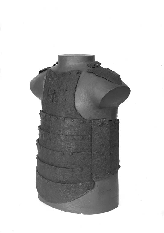 Harnesk nr 1, från massgrav 2. Motiv: Korsbetningen Nyckelord: Riksintressen Kategori: Fornminnen, Övriga lämningstyper, Övrigt Harnesk nr 1, från massgrav 2.